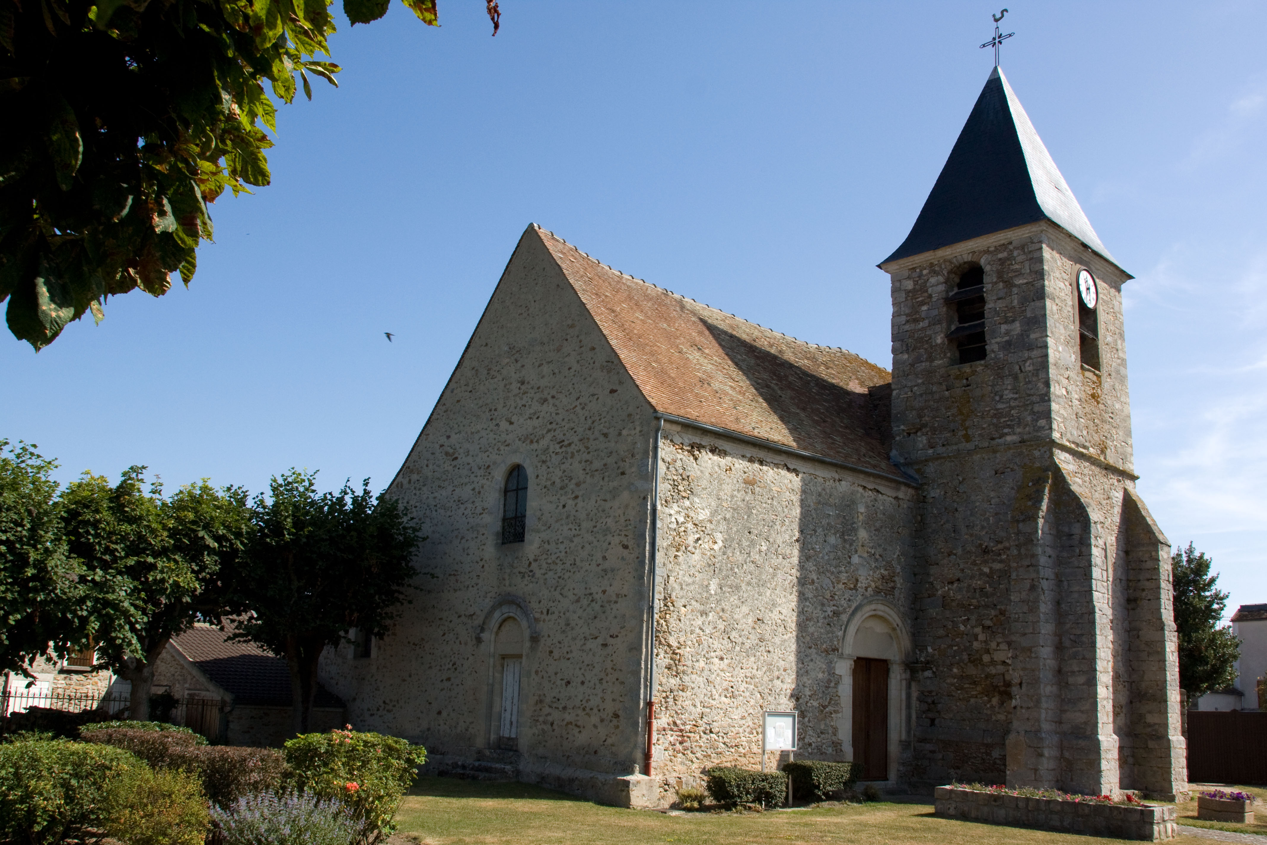 Eglise d'Auvernaux, Auvernaux, Essonne, France